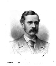 Portrait von Augustus Raymond Margary (1846-1875)